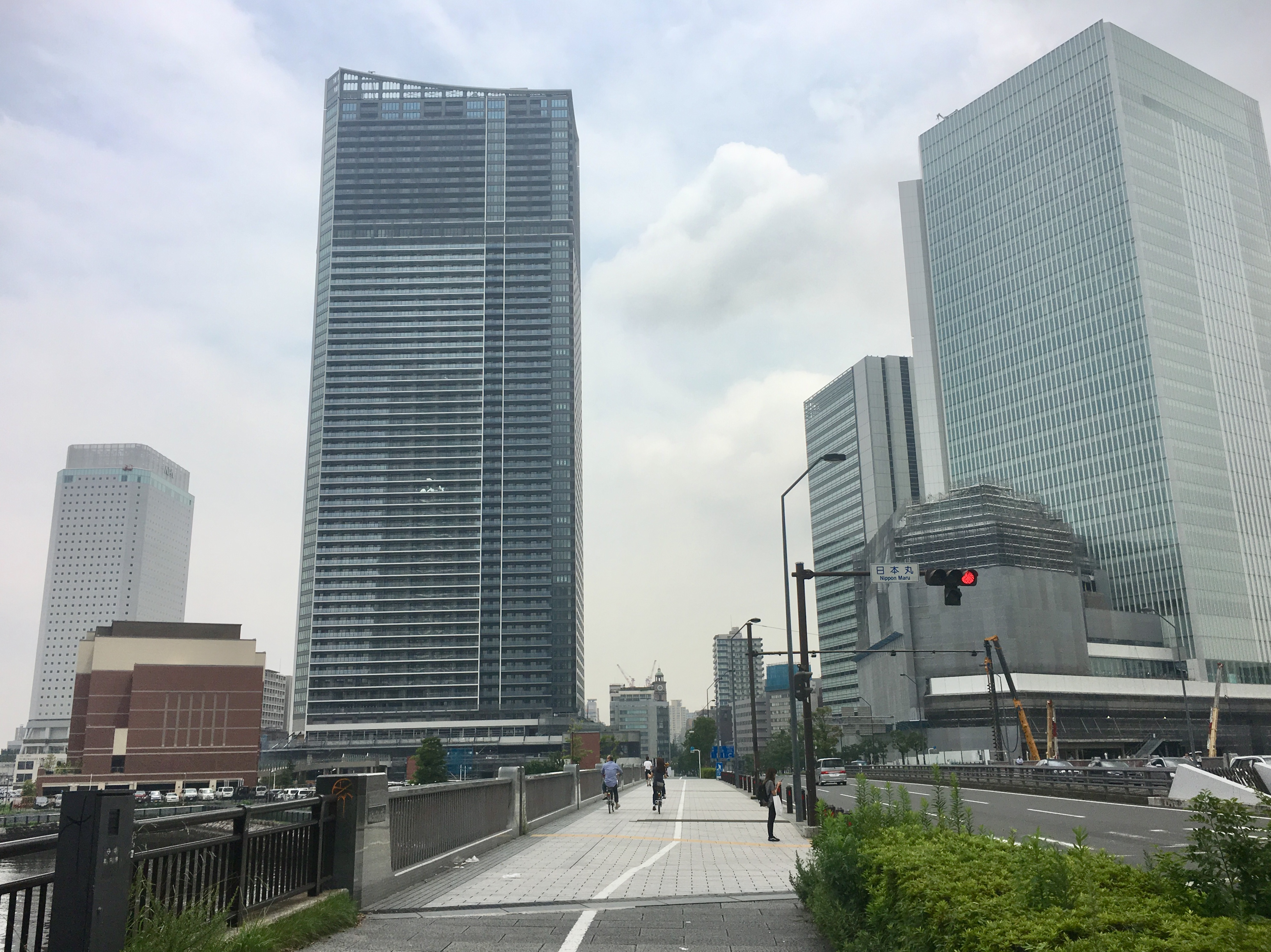 開発が進む横浜・北仲通地区（2019年7月時点）。下部の道路は栄本町線（北仲橋）。